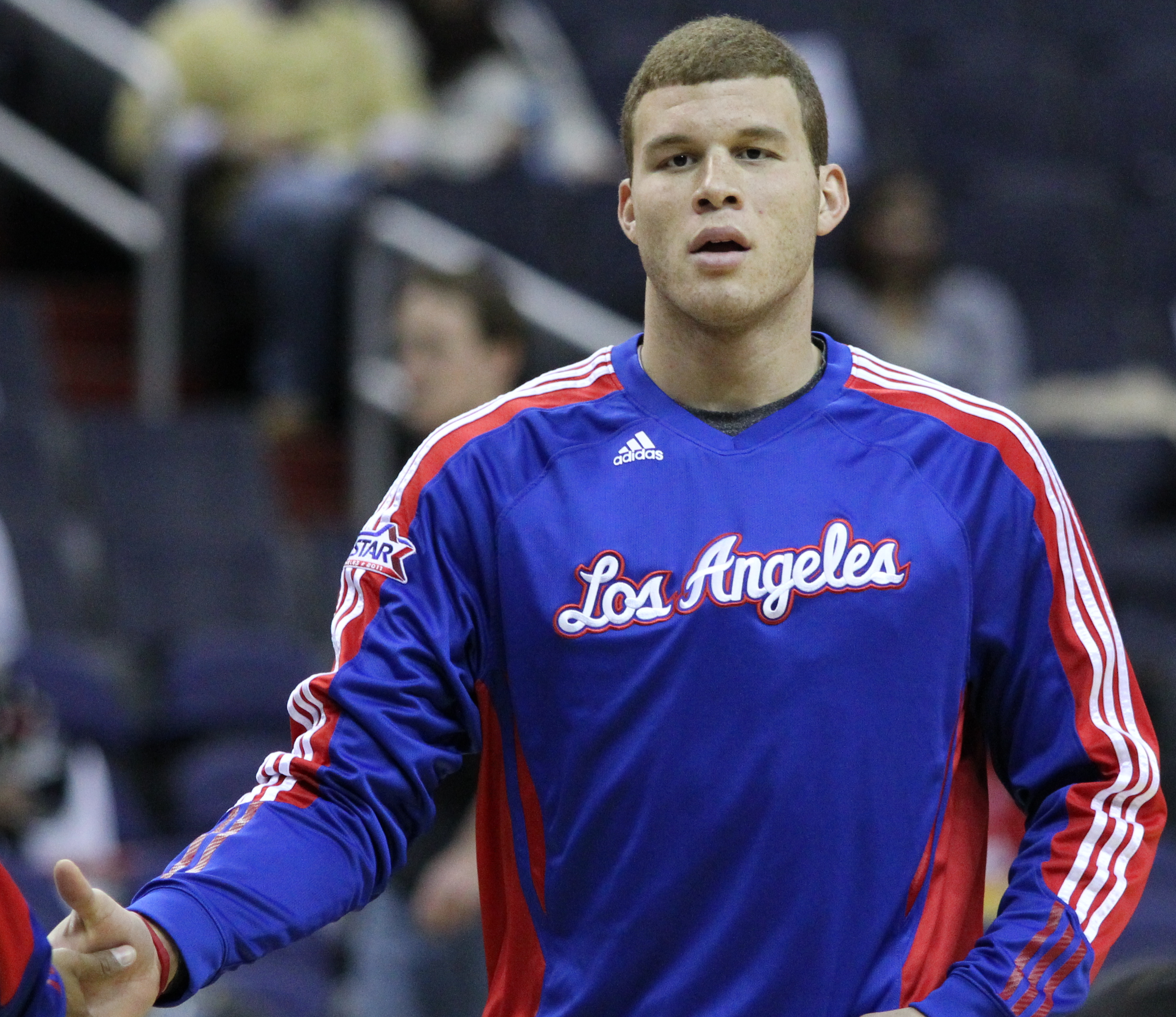 Wizards v/s Clippers 03/12/11